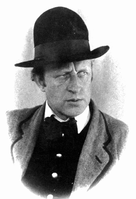 Limfjordsforfatteren Johannes Buchholtz (1882-1940)